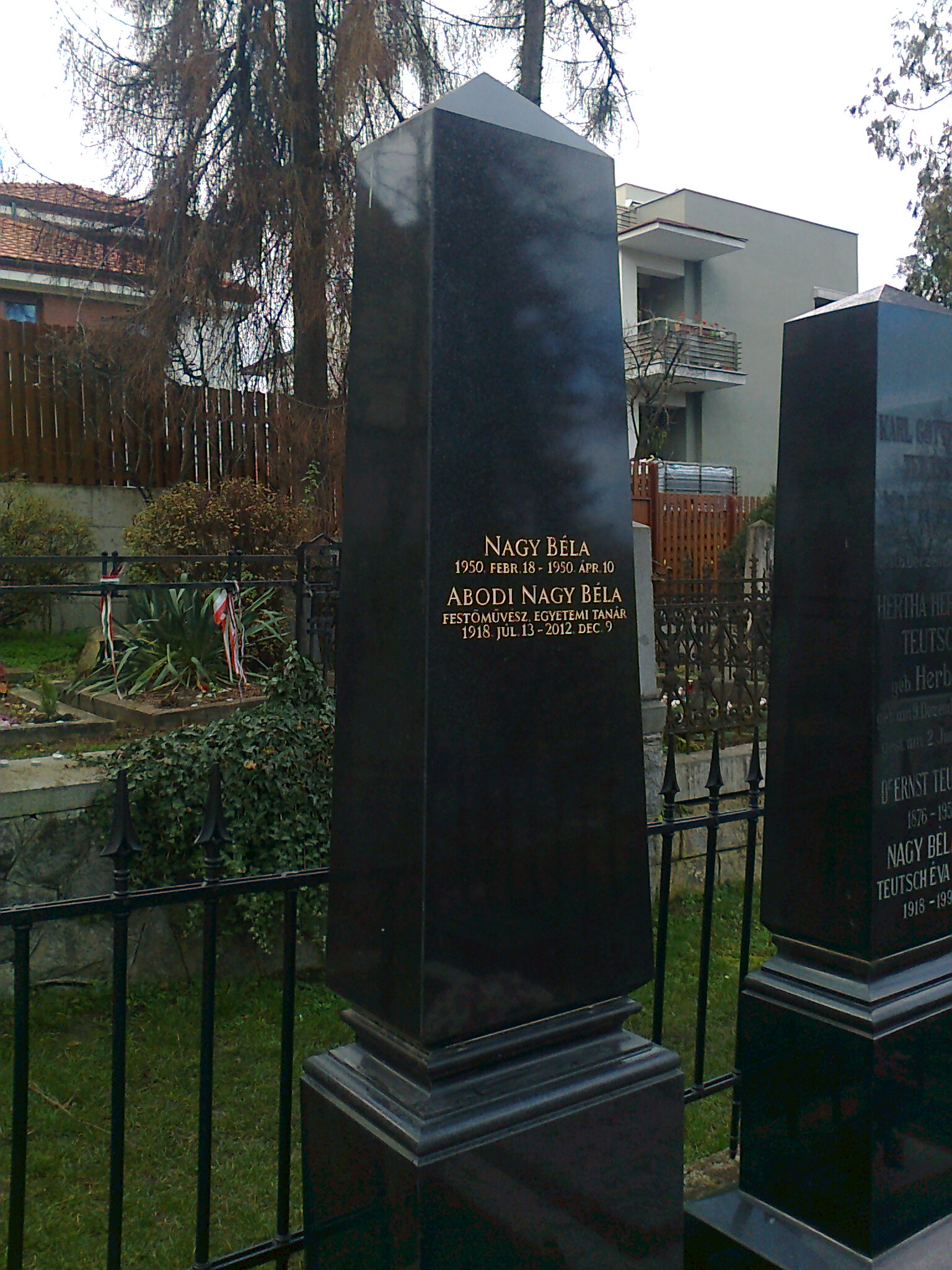 Abodi Nagy Béla sírmeléke a Házsongárdi temetőben (Kolozsvár)